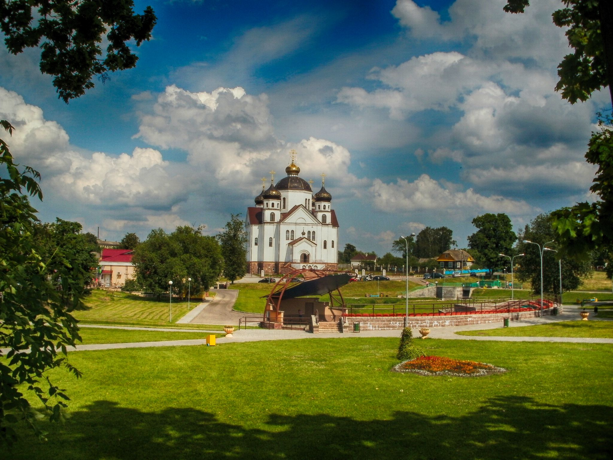 Беларуская (тарашкевіца): Смаргонь, царква Перамяненьня Гасподняга